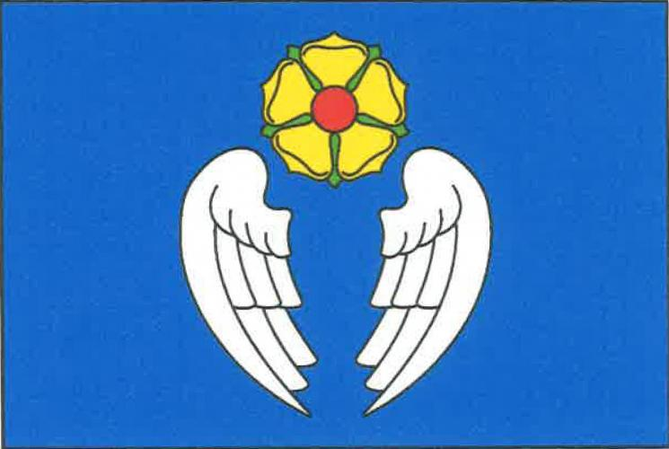 Bořetín (JH), vlajka. List tvoří tři vodorovné pruhy, modrý, žlutý a modrý, v poměru 1 : 6 : 1. Ve žlutém pruhu dva vztyčení černí přivrácení medvědi s modrou zbrojí a jazyky, držící svisle červený list gonfanonu se třemi cípy a třemi závěsnými kroužky, v něm bílá vykořeněná lekna, mezi nimi žlutý křížek. Poměr šířky k délce listu je 2 : 3.